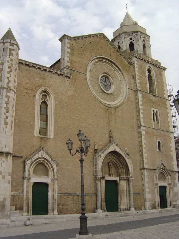 Cattedrale van Lucera